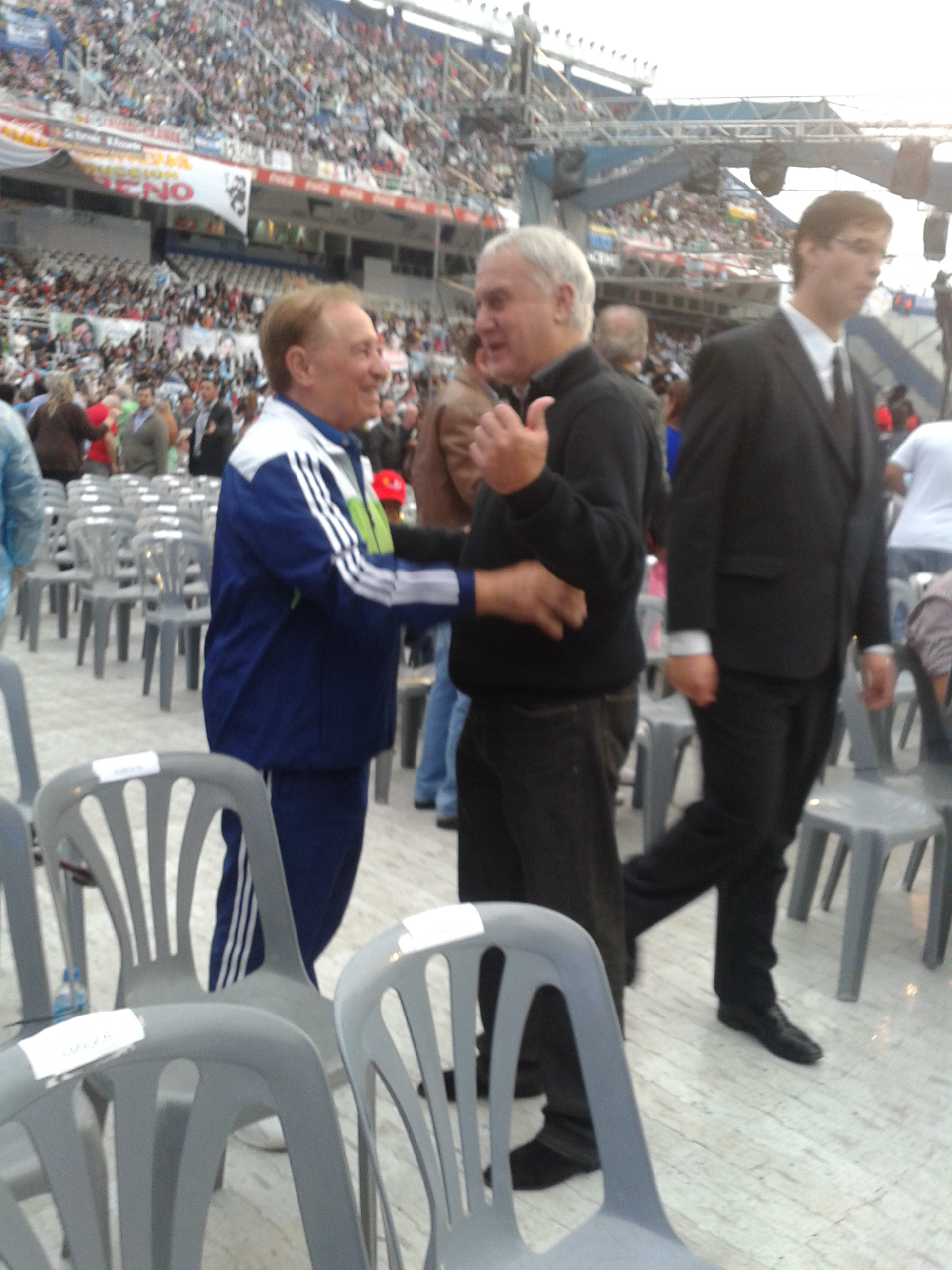 José Sanfilippo y Norberto Alonso en un acto en cancha de Vélez.